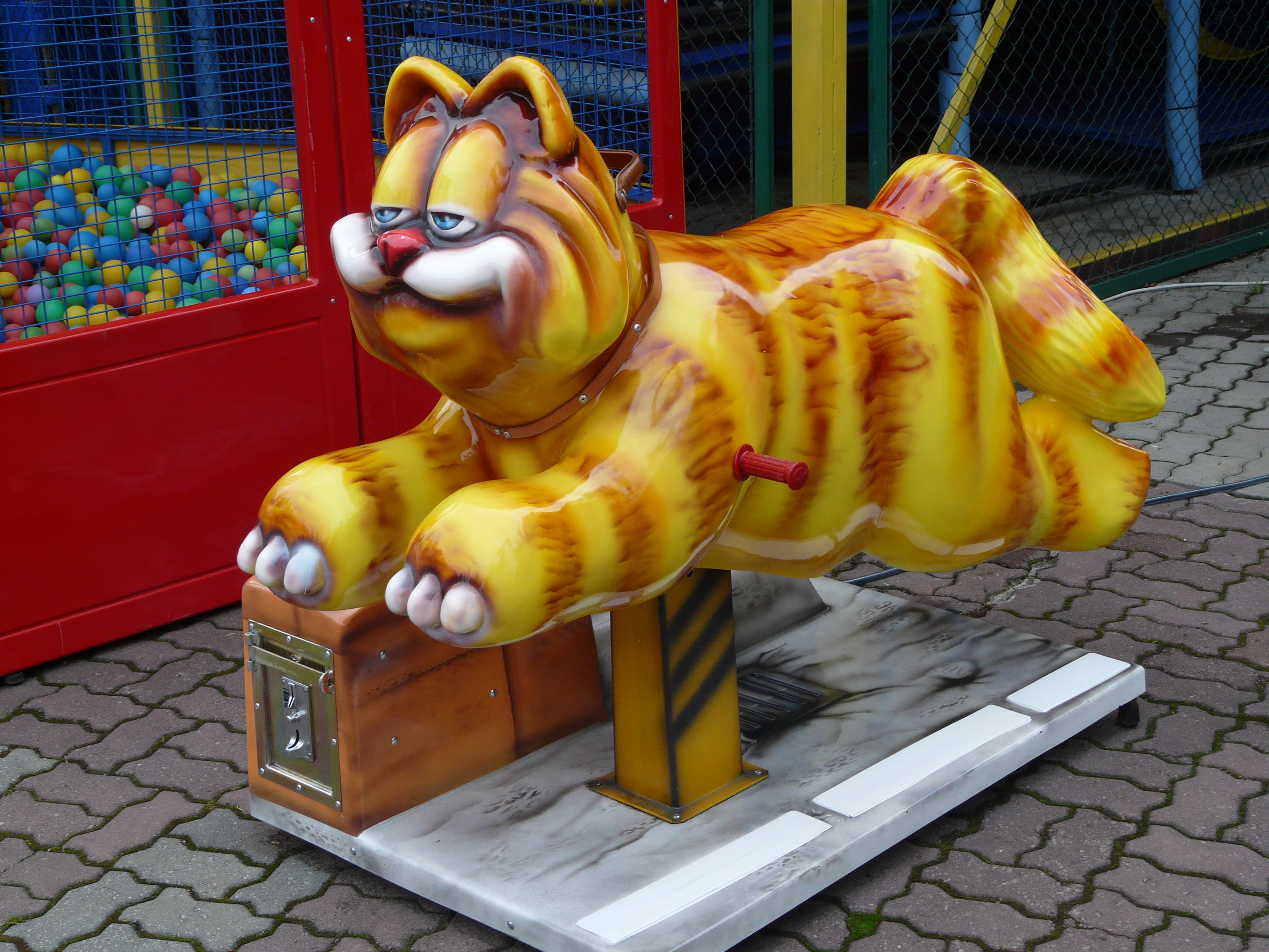 Rabkoland